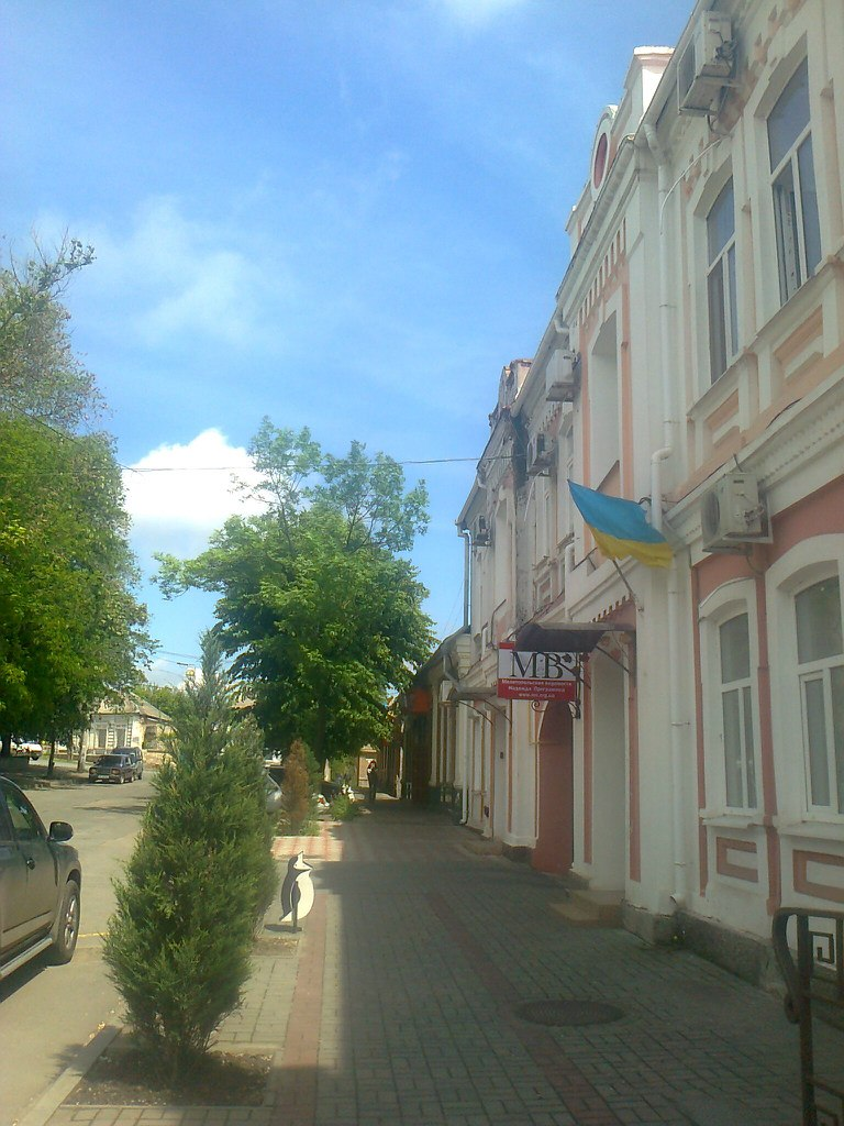 Мелитополь